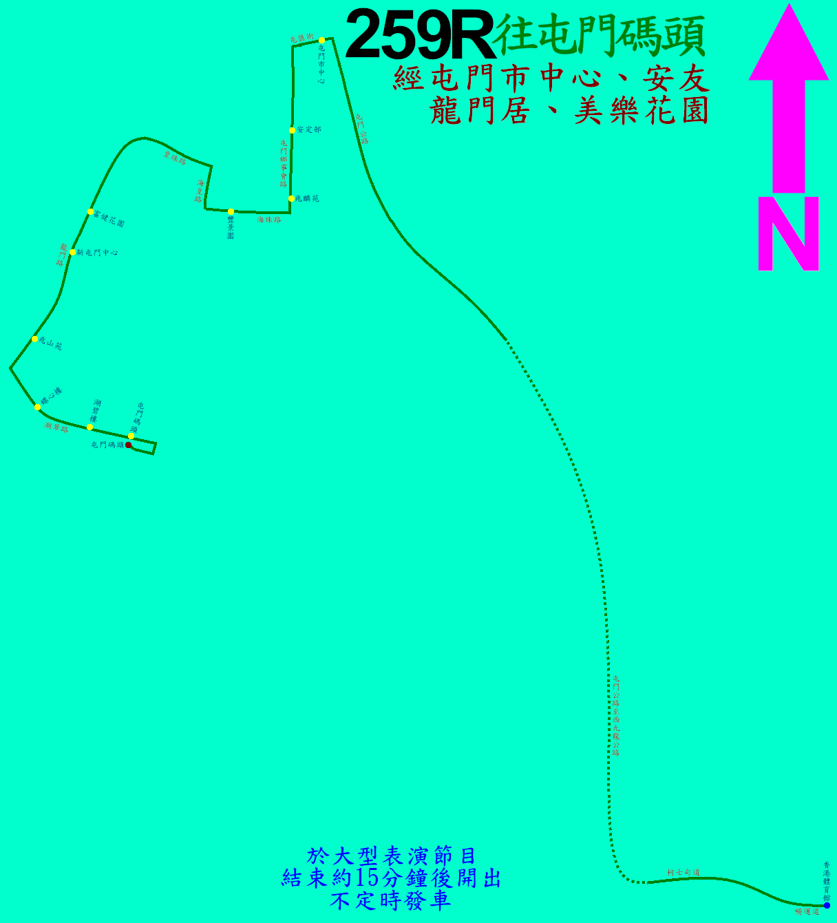 中文（香港）: 九巴259R線的走線圖